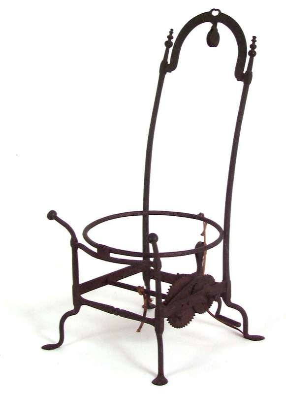 Kaffeheis fra 1800-årene. Foto Anne Lise Reinsfelt / Norsk Folkemuseum, NF.1896-0787.